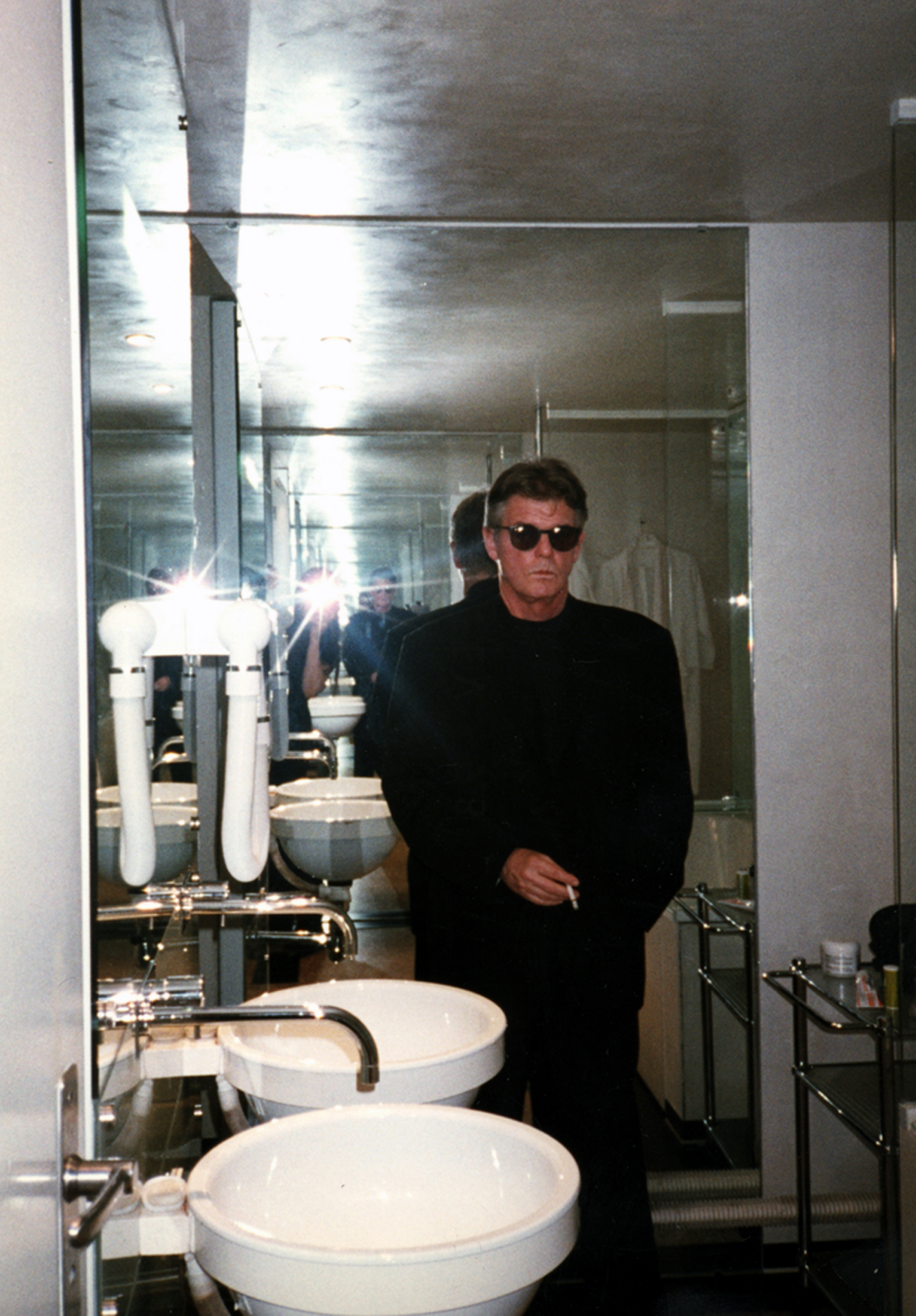 Lewis Baltz in Jean Nouvel's Amat hotel.